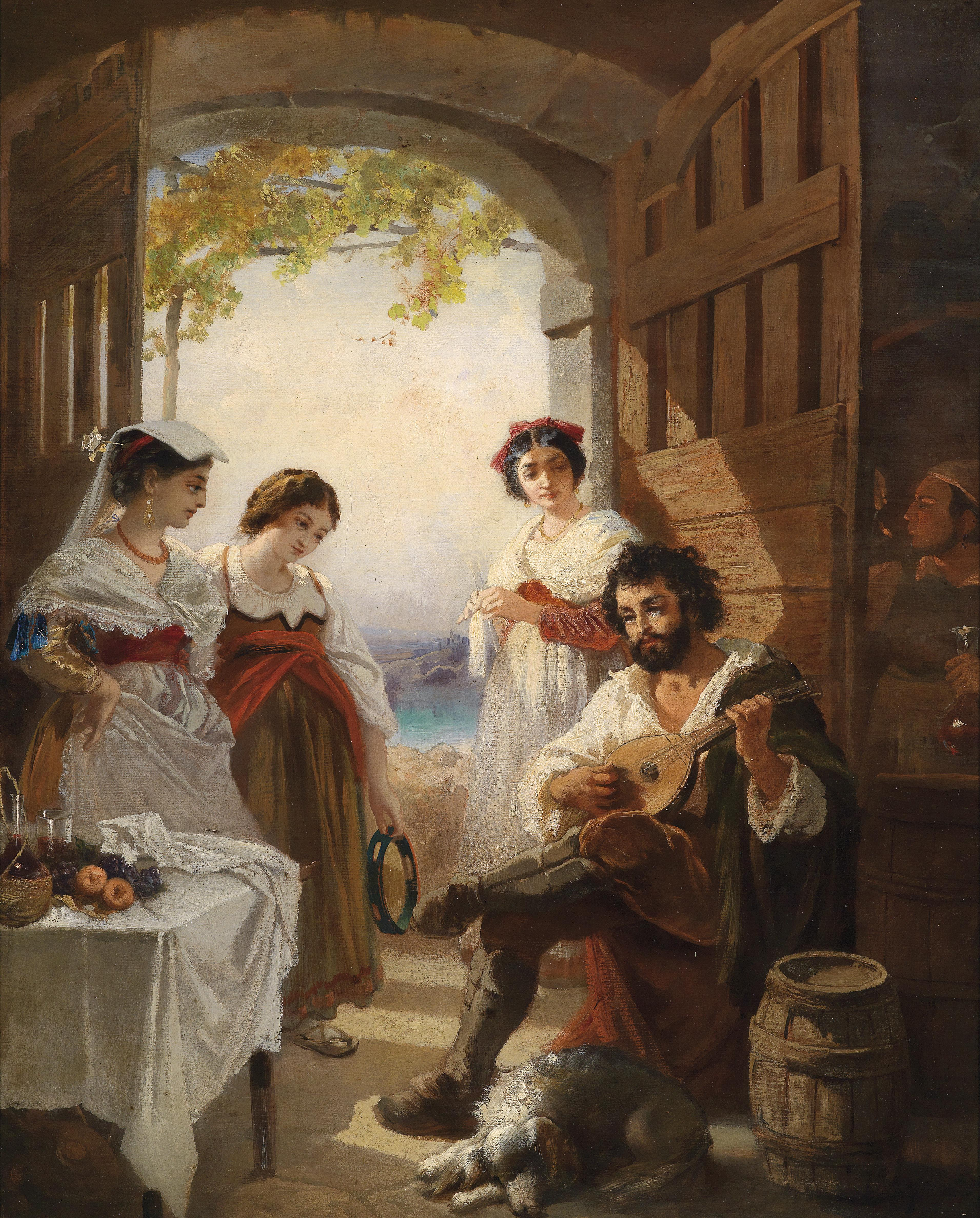 Neapolitanische Schenketitle QS:P1476,de:"Neapolitanische Schenke" label QS:Lde,"Neapolitanische Schenke"